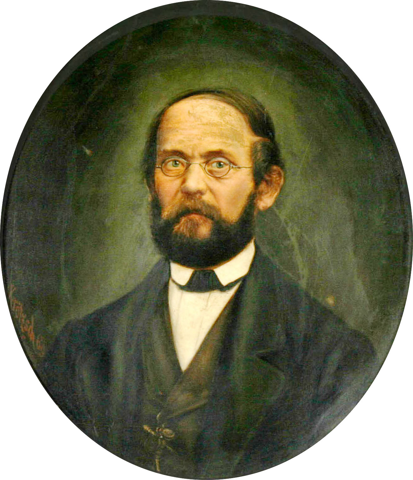 Adolf Eltzner (1816–1891), Öl auf Pappe, 54 × 47 cm